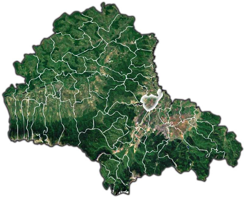 Halchiu jud Brasov